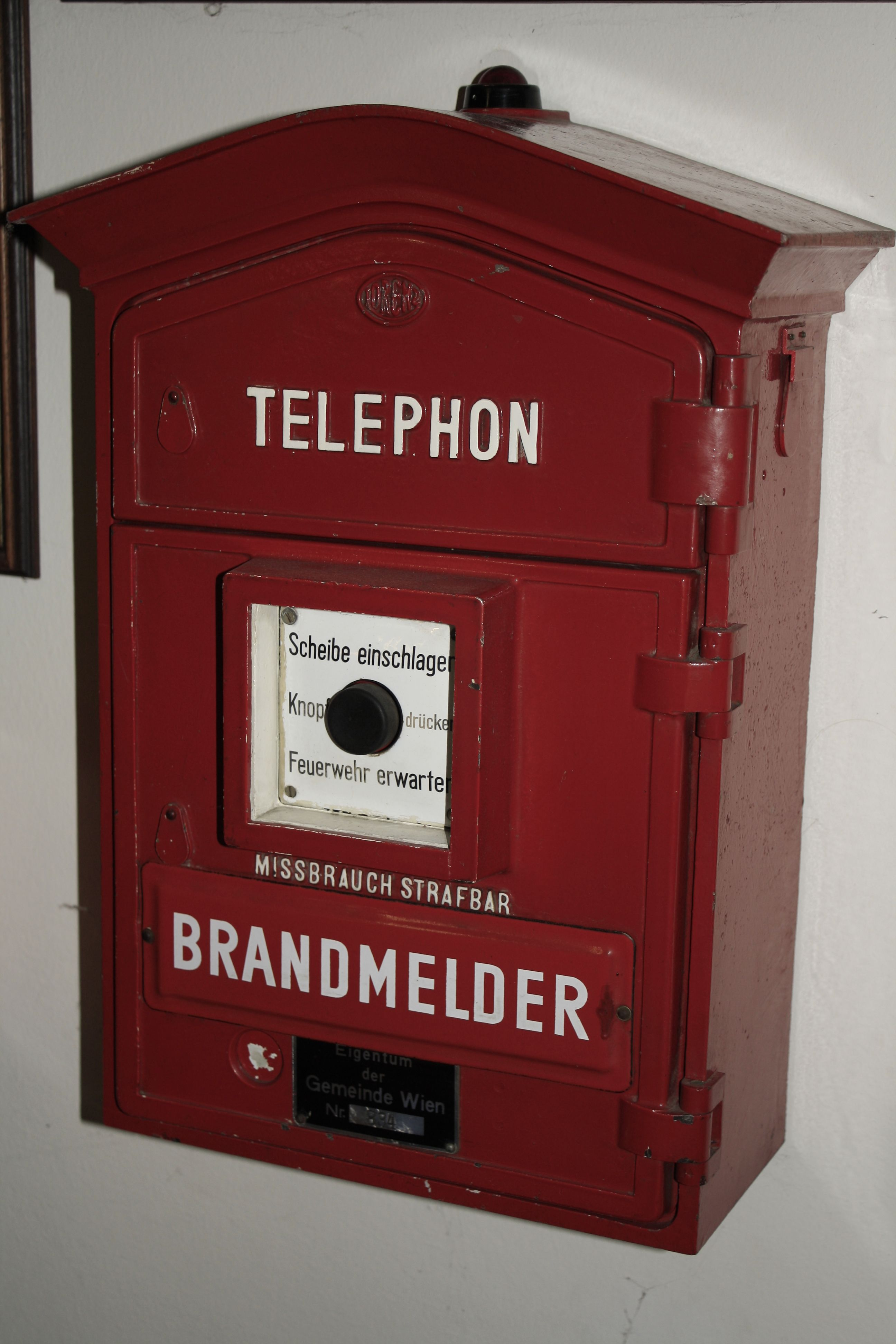 Historischer Feuermelder der Feuerwehr Wien im Feuerwehrmuseum Perchtoldsdorf, Niederösterreich